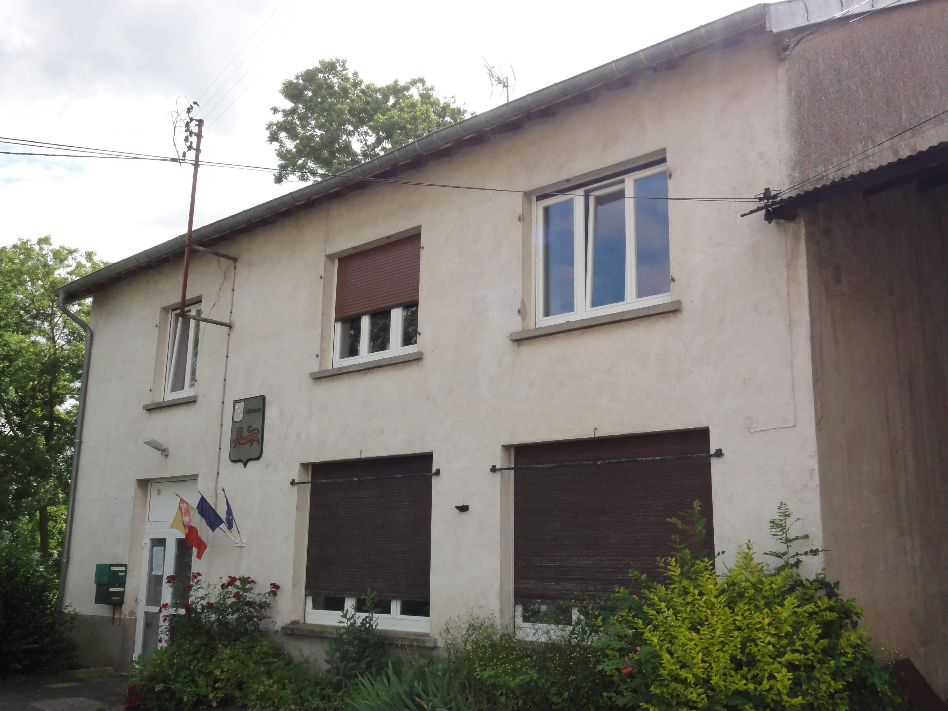 Gellenoncourt (M-et-M) mairie